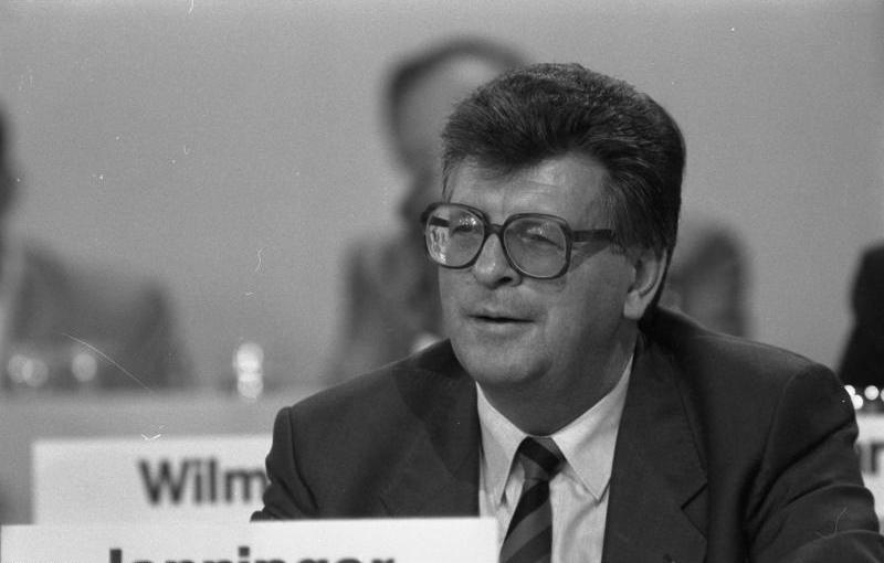 CDU Bundesparteitag Mainz 7.-8. Oktober 1986